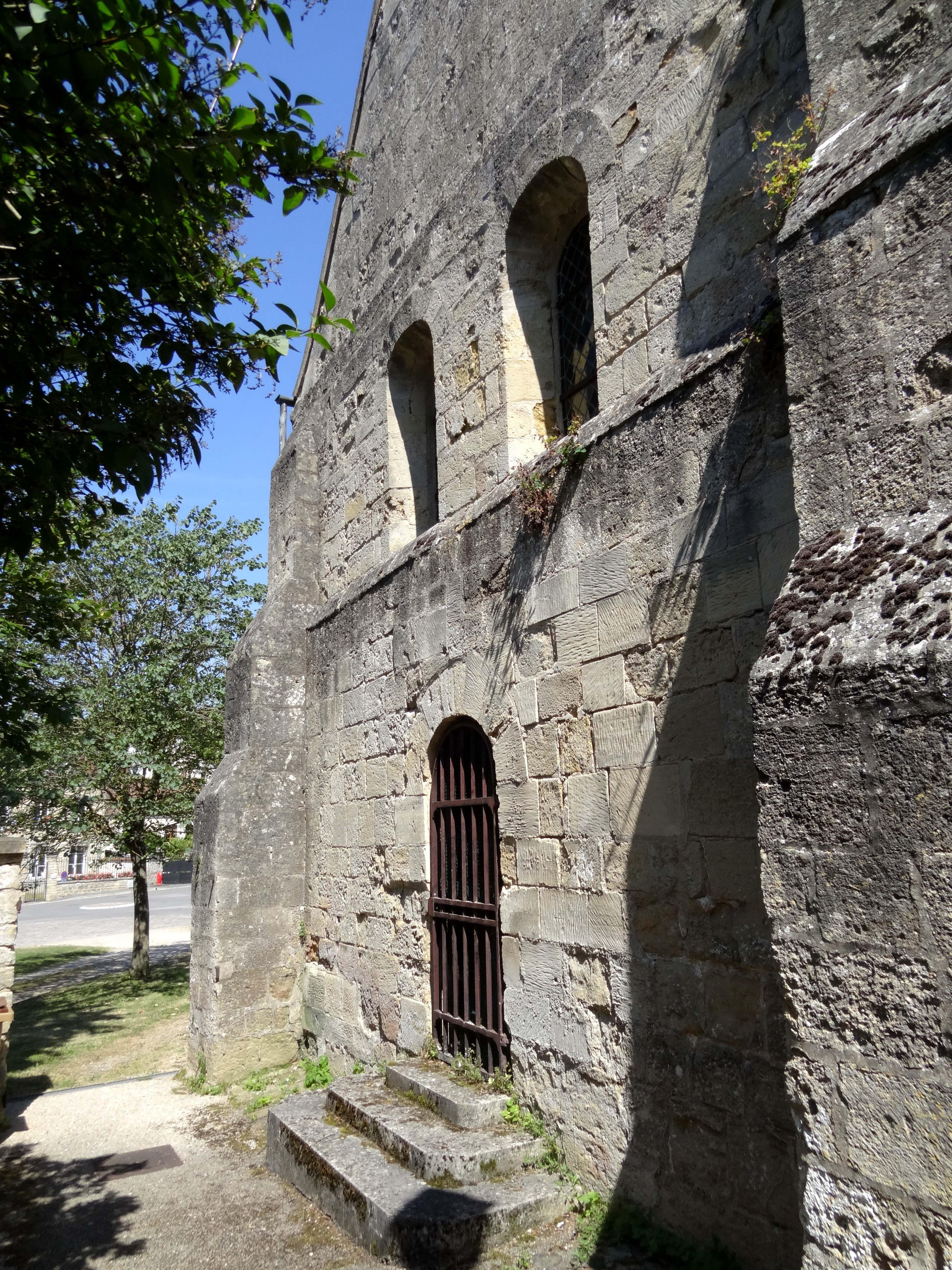 Église Notre-Dame-de-l'Assomption de Gaillon-sur-Montcient - voir titre.